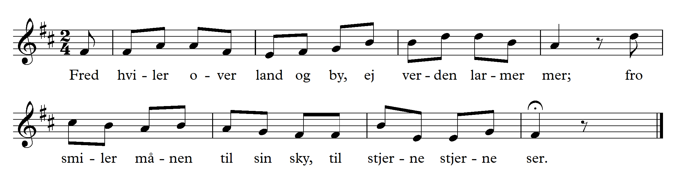 Anden melodi til aften/julesang